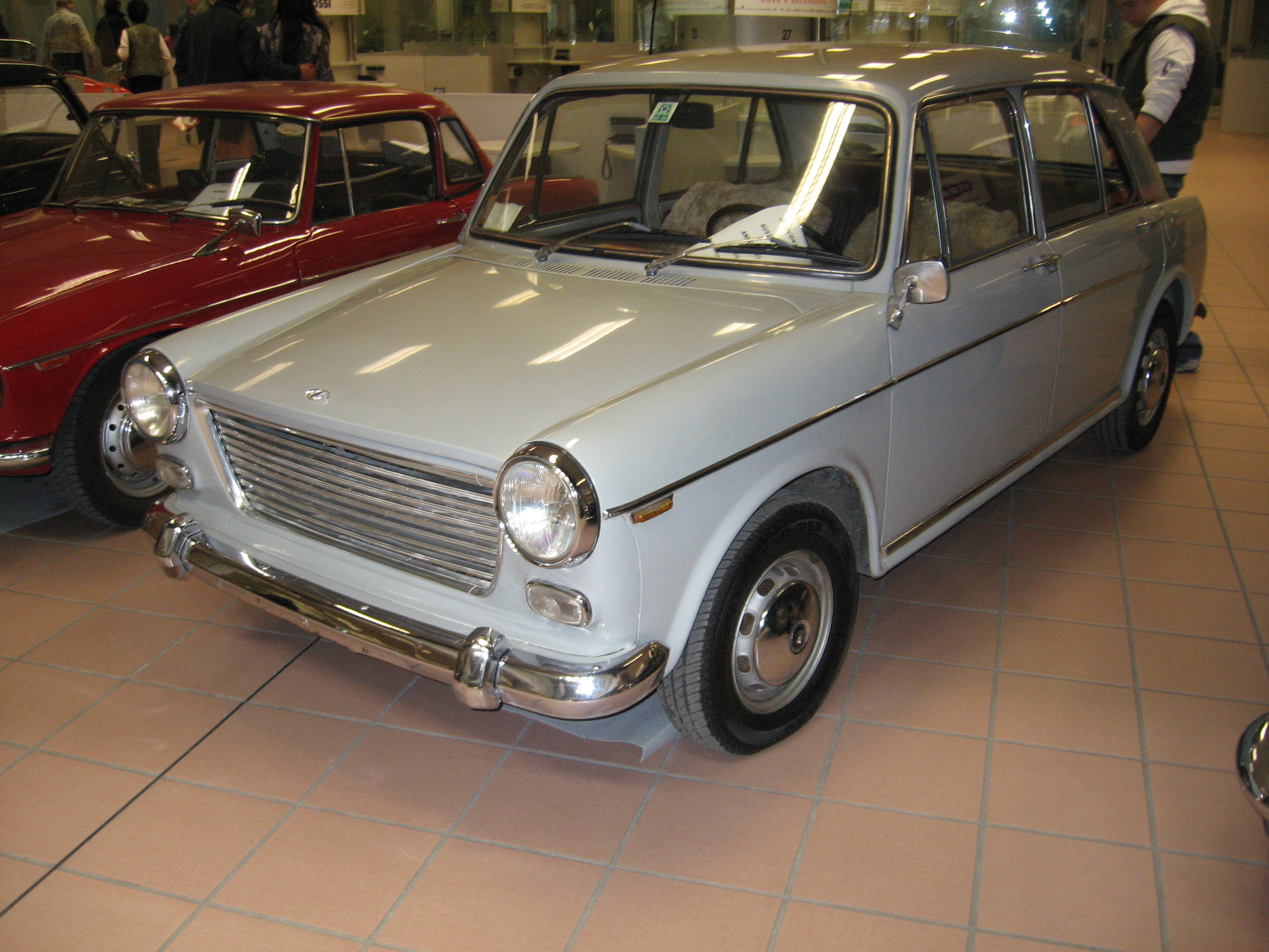 Subject